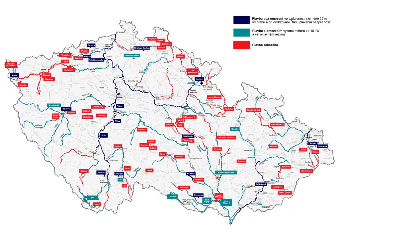 Na této mapě naleznete popsané všechny vodní cesty, na kterých je možné využívat vodní skútry, po platnosti nové vyhlášky č. 46/2015.